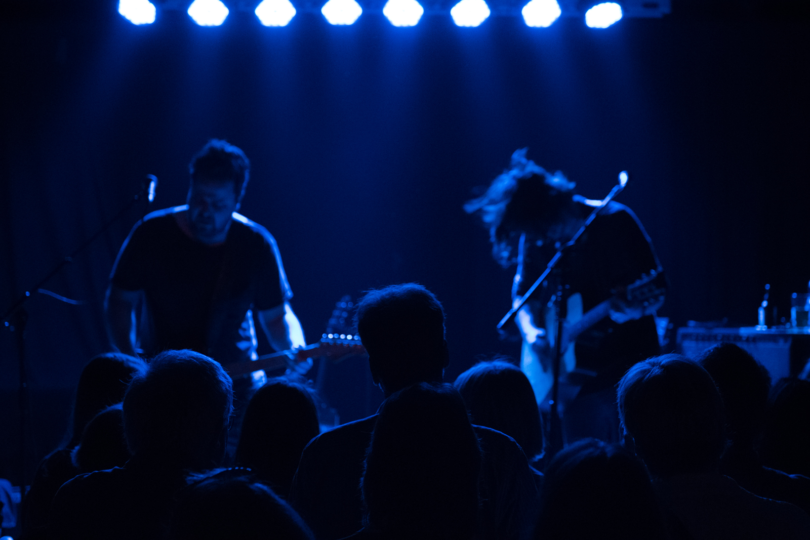 Live im Indra. Hamburg 2016.